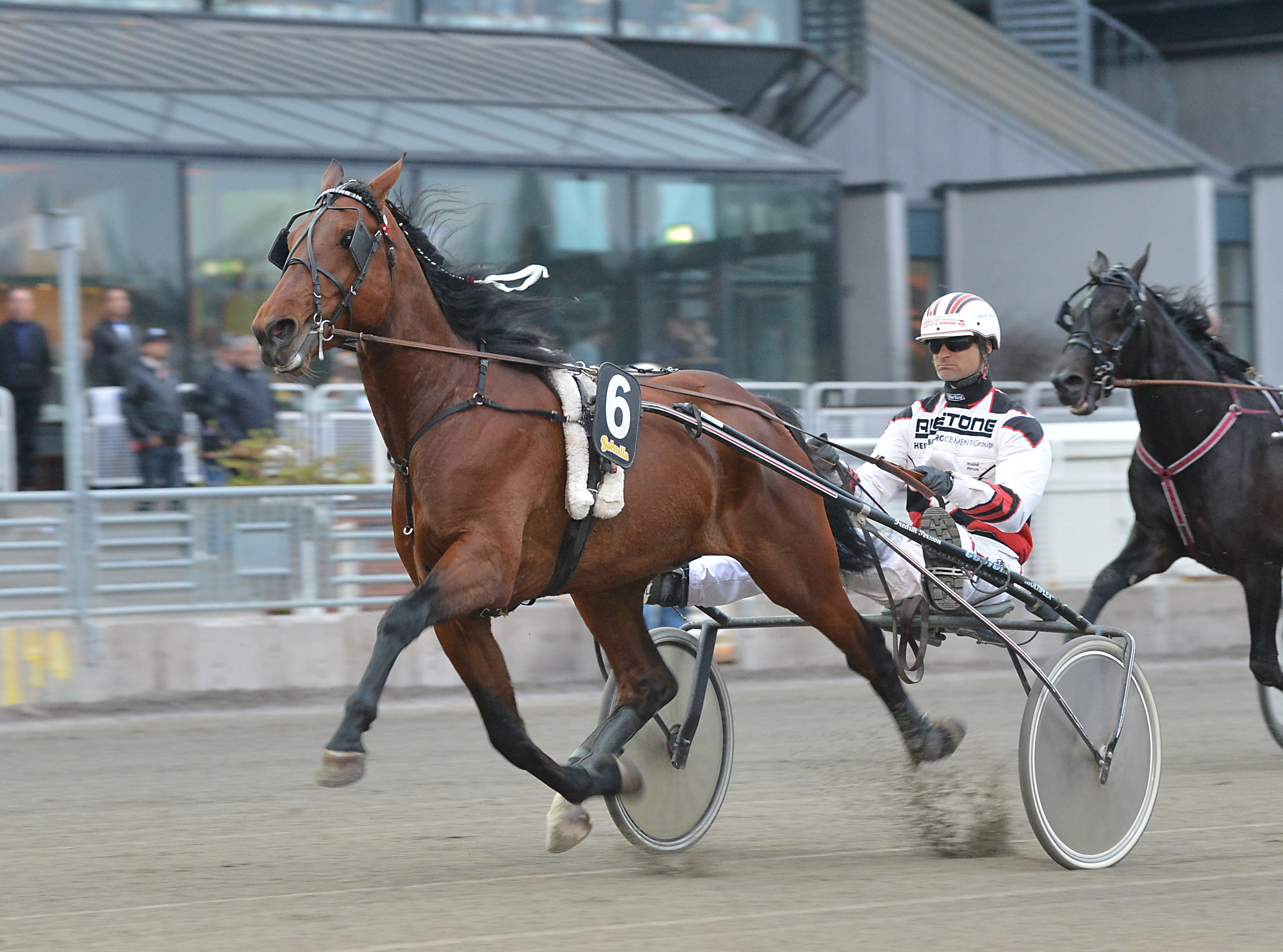 Boys Going In med sin tränare och kusk Fredrik Persson på Solvalla den 8 maj 2013.